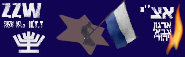 zzw